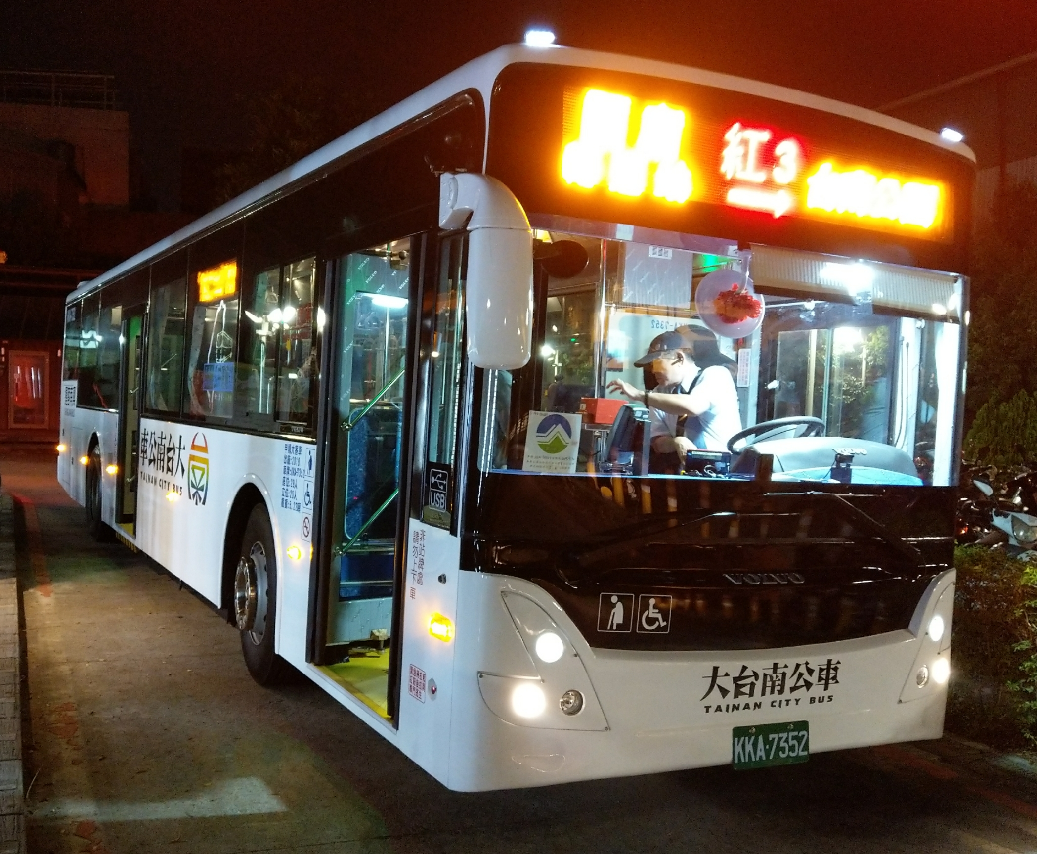 中文（台灣）: 興南客運2018年9月出廠VOLVO B7RLE，大台南公車紅線配車KKA-7352